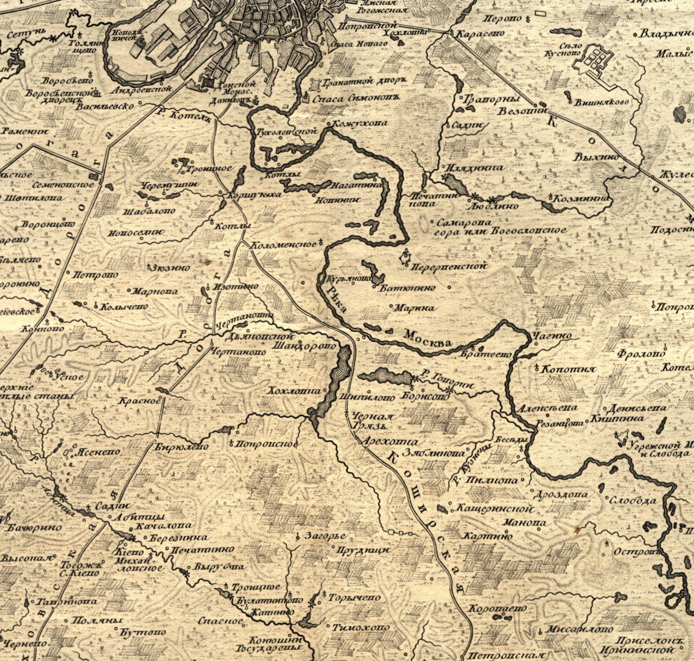 Территория современного Южного административного округа, 1766 год